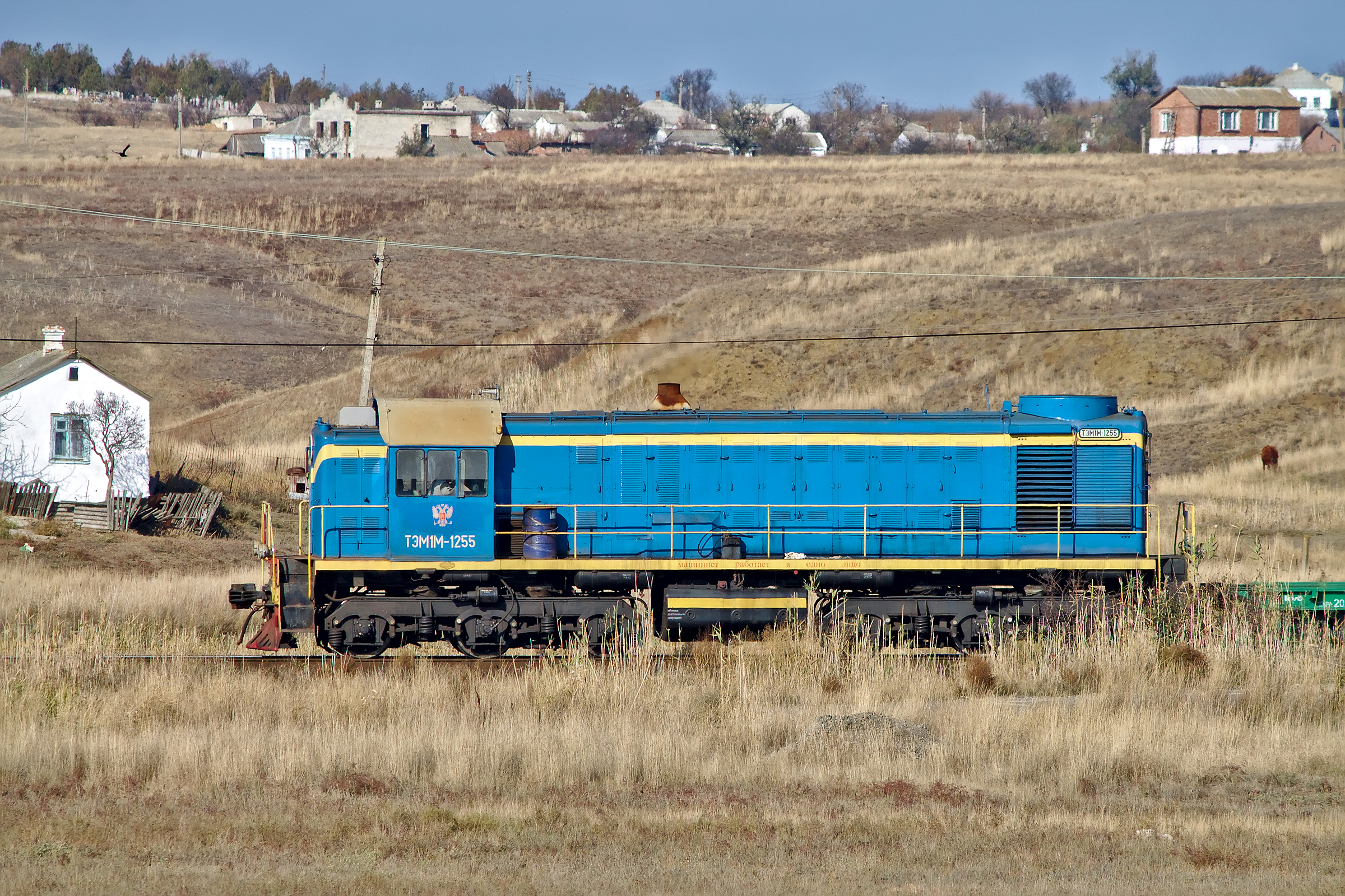 ТЭМ1М-1255, паромная переправа Крым - Кавказ. см. фото 628061 в альбоме автора